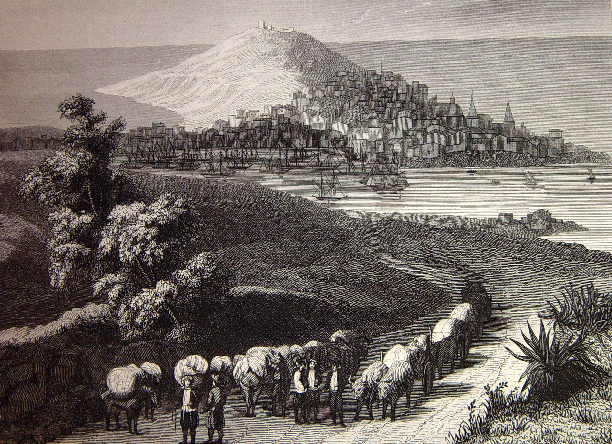 "Coruña". Ilustraciones pertenecientes al libro: Las glorias nacionales : grande historia universal de todos los reinos, provincias, islas y colonias de la Monarquía Española, desde los tiempos primitivos hasta el año de 1852. - Madrid [etc.] (Barcelona : Imprenta de Luis Tasso) Librería de la Publicidad [etc.], 1852-1854.